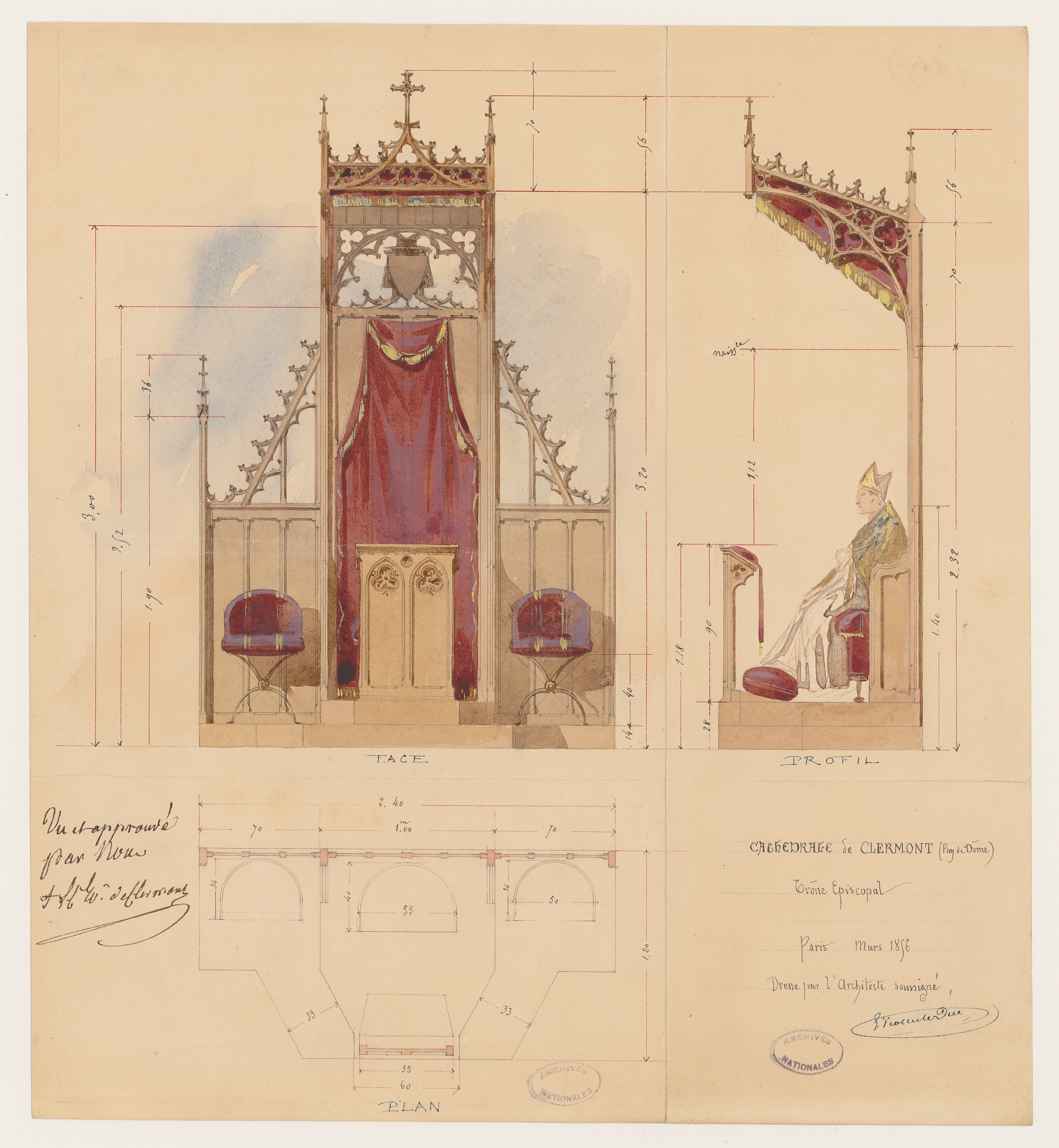 Cathédrale de Clermont (Puy-de-Dôme). Trône épiscopal. Plan issu des dossiers de travaux de restauration des cathédrales (1802-1912), conservés aux Archives nationales (inventaire et autres documents numérisés consultables en ligne).